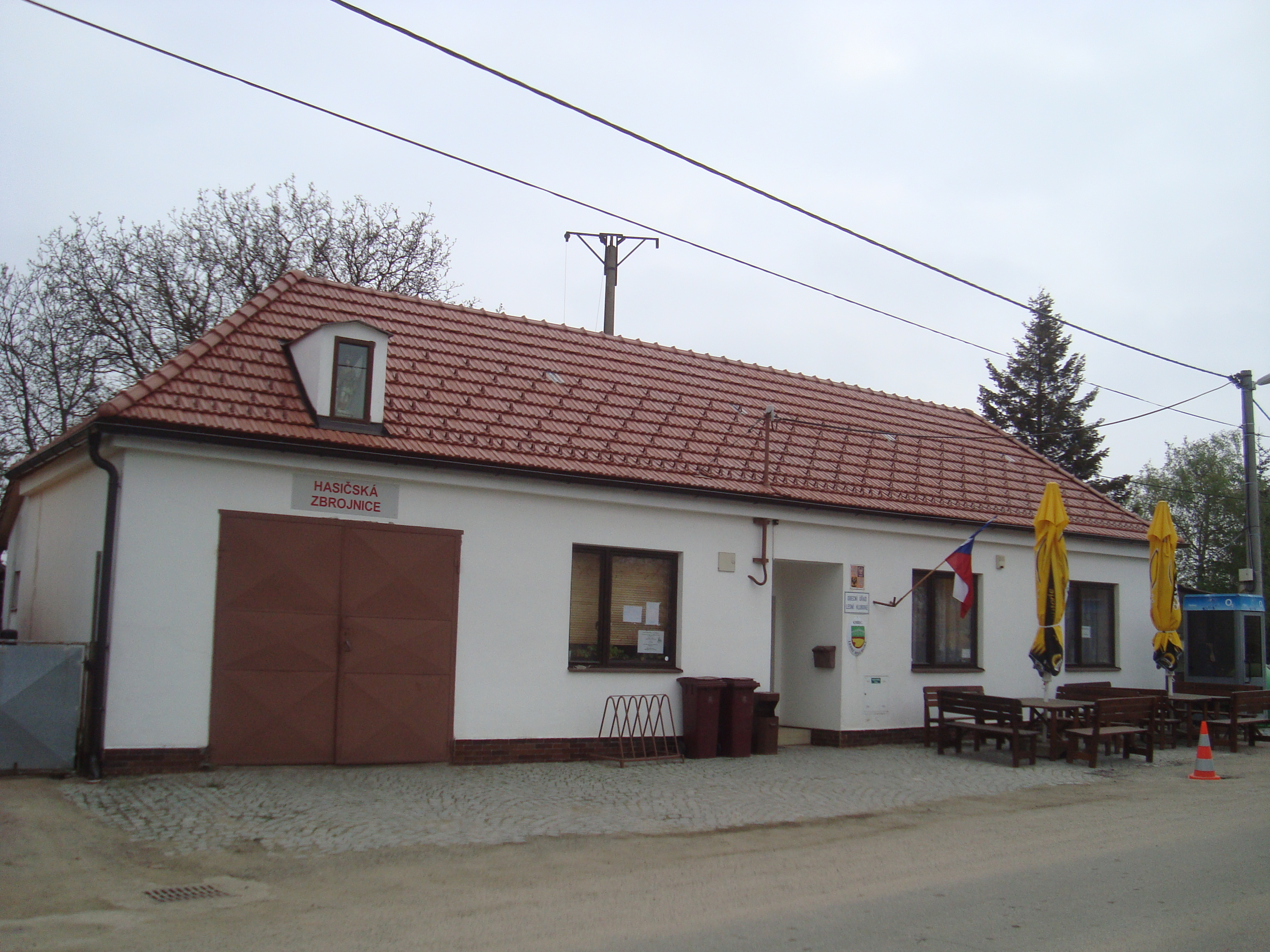 Obecní úřad Lesní Hluboké